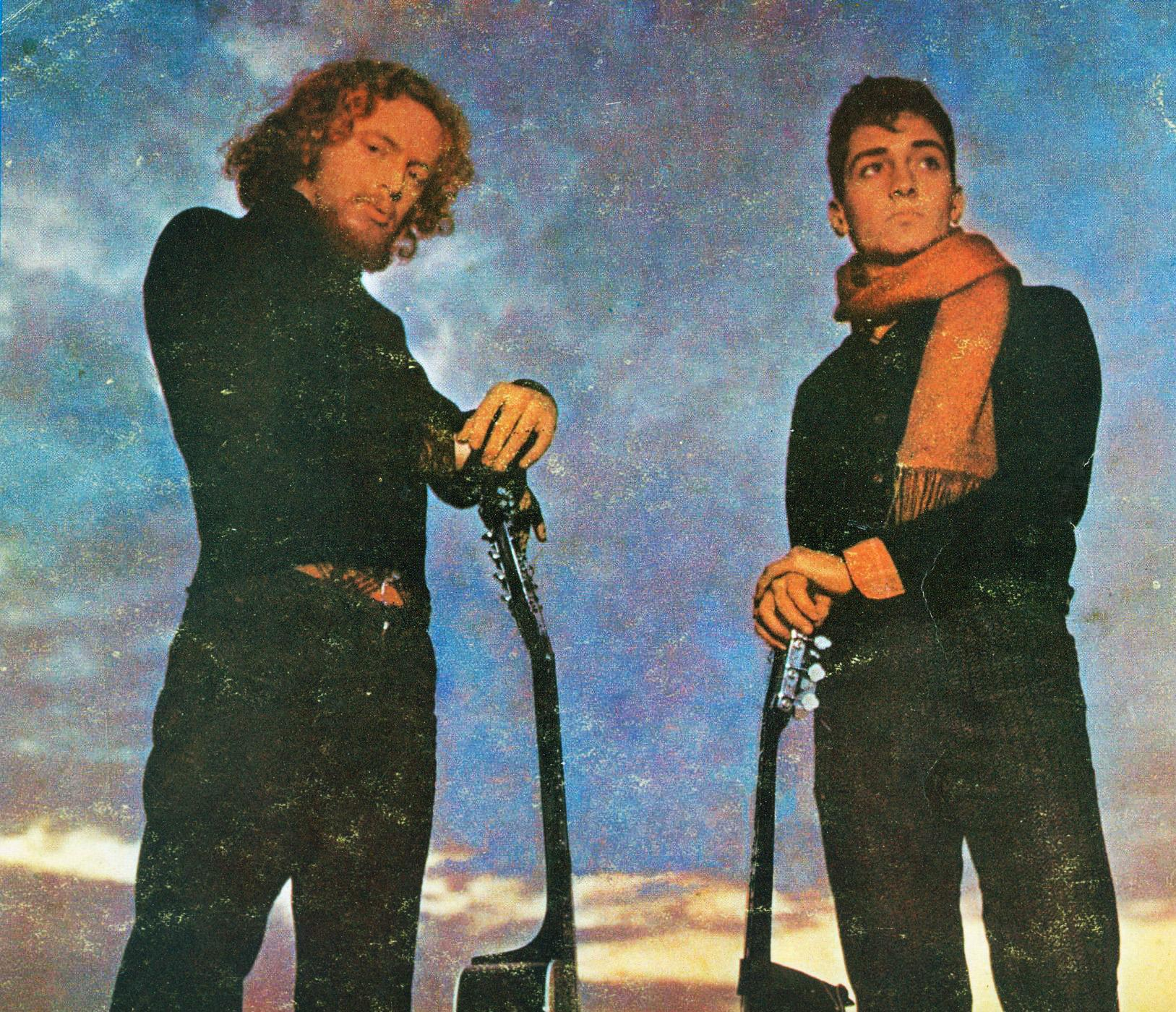 Pedro y Pablo, dúo argentino de las décadas de 1970 y 1980